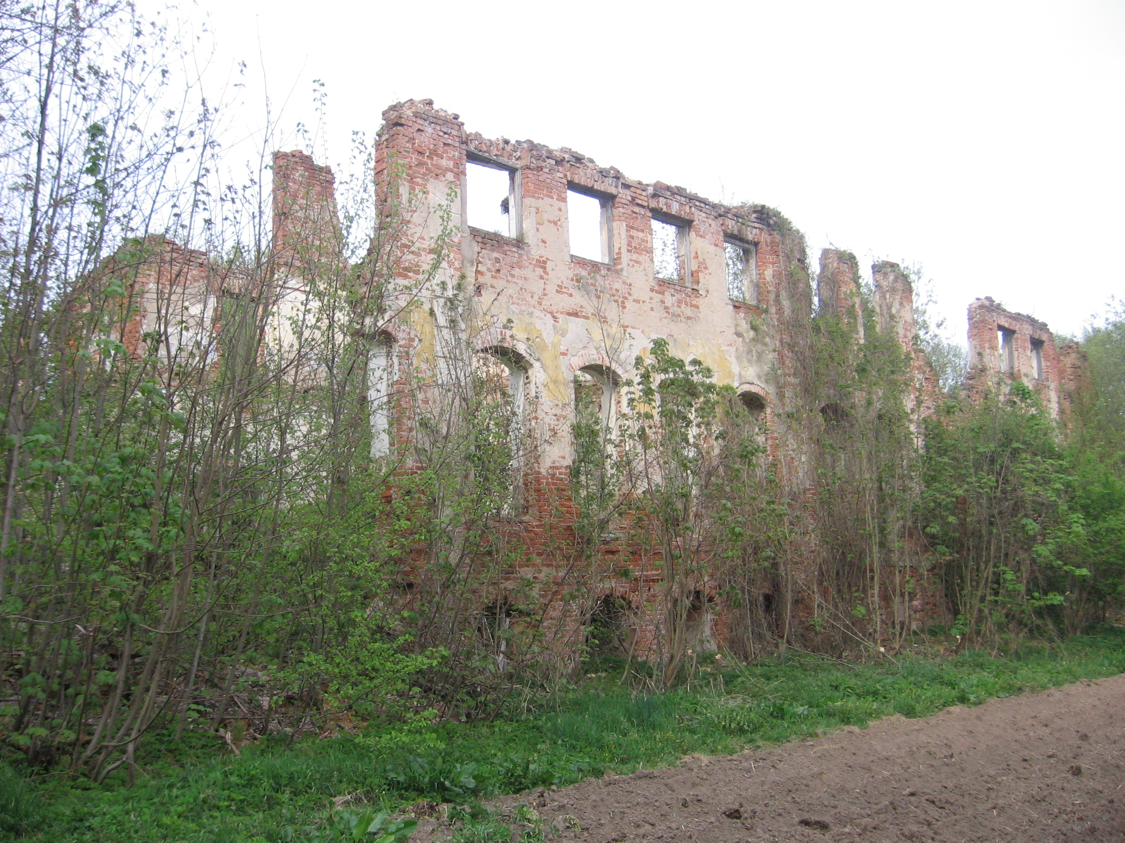 ARKLITY - RUINY PAŁACU RODU EGLOFFSTEIN